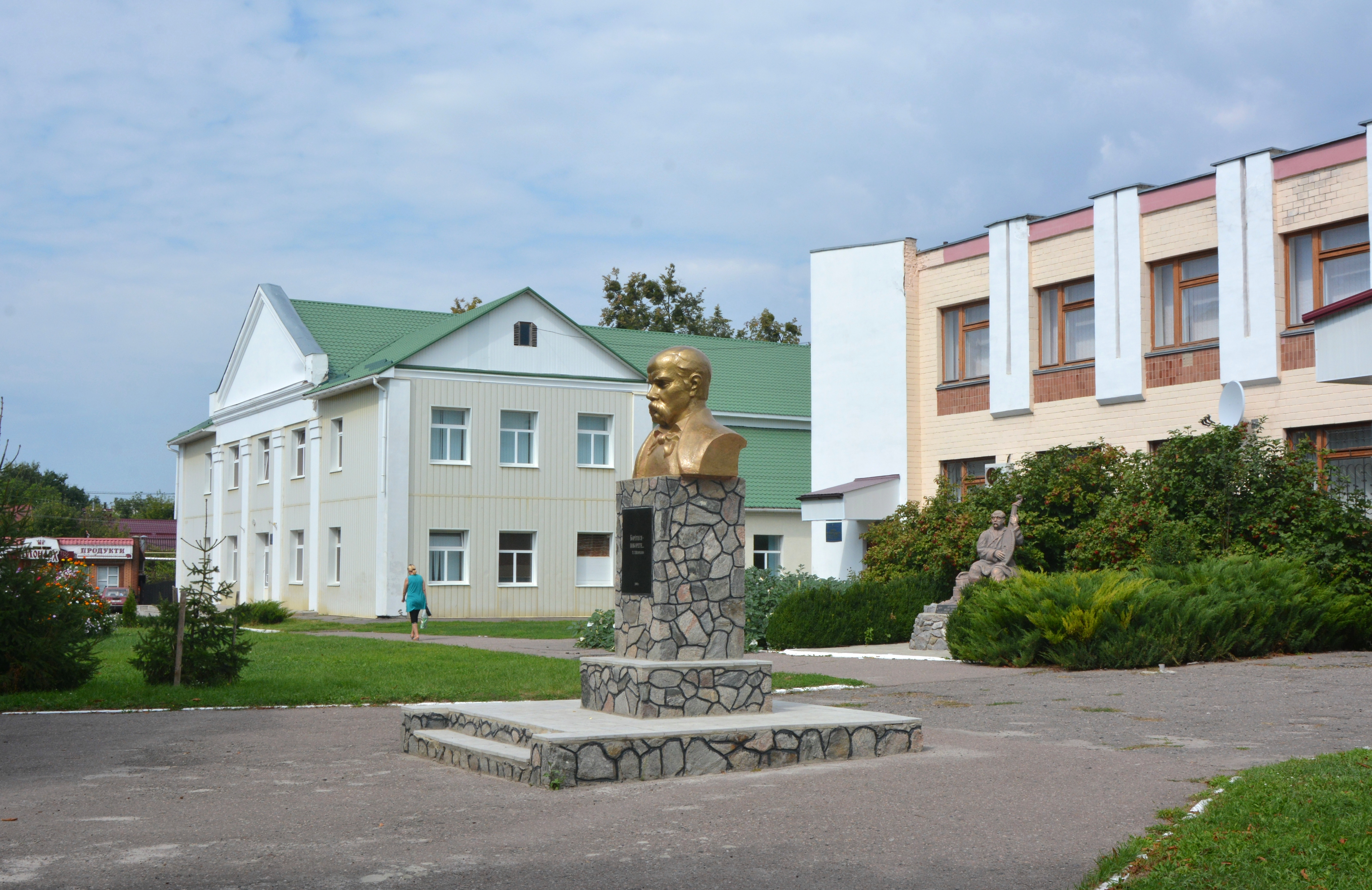 Пам’ятник-погруддя Т.Г.Шевченку., Велика Багачка смт, центр.